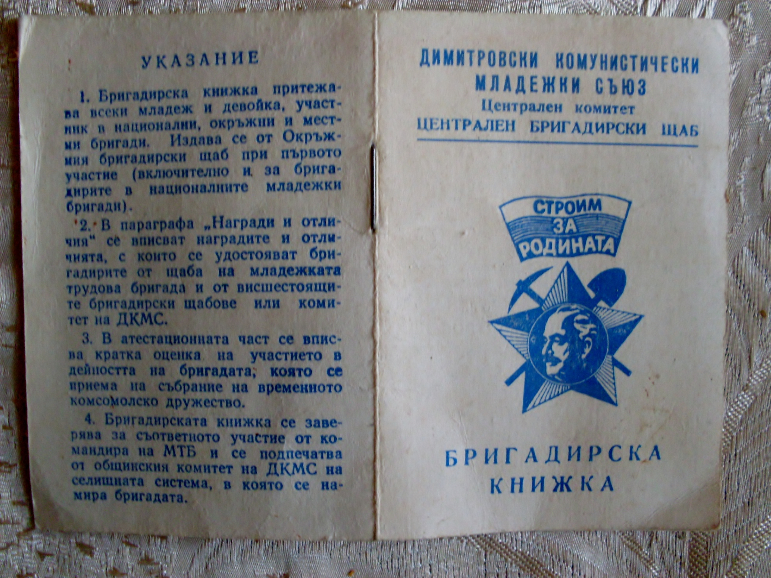 Бригадирска книжка издадена от ЦК на ДКМС, корица